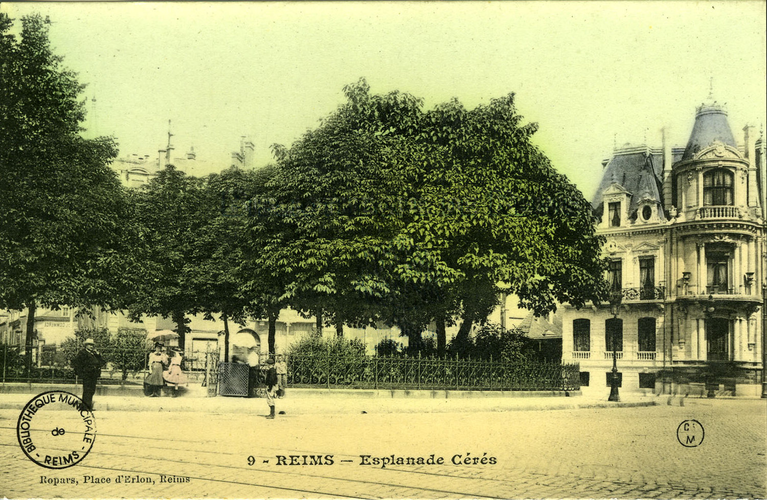 à Reims.